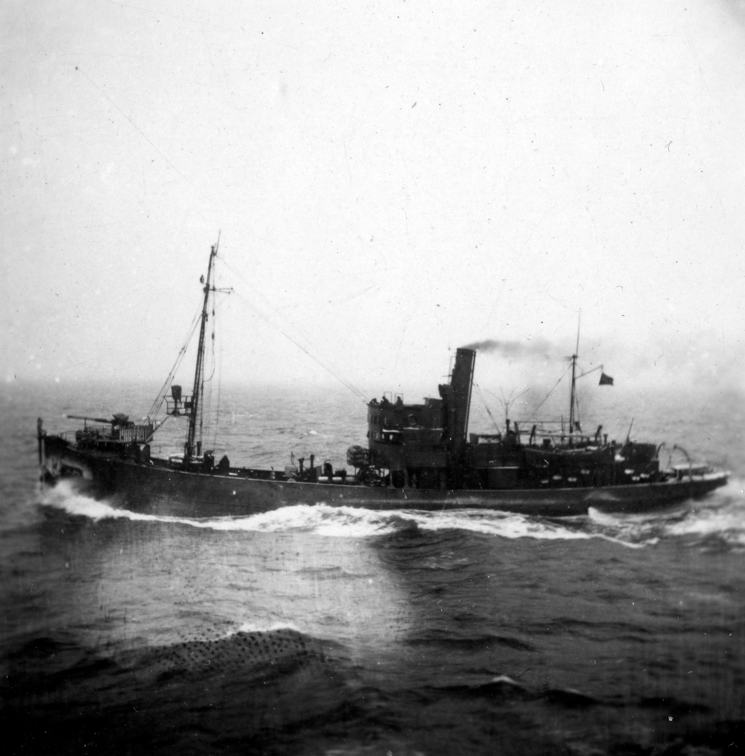 Format: Svart-hvitt fotopositiv Dato / Date: Januar 1942 Fotograf / Photographer: Fridolin Zint (1907 - 1985) Sted / Place: Skagerrak Wikipedia: Vorpostenboot Eier / Owner Institution: Trondheim byarkiv, The Municipal Archives of Trondheim Arkivreferanse / Archive reference: Tor.H49.B07.FZ062 Merknad: Bilder donert til Trondheim byarkiv av Joachim Zint, sønn av ingeniør Fridolin Zint (1907 - 1985). Fridolin Zint tjenestegjorde i Trondheim 1942 som Gefreiter ved Festungs-Pionier-Kommando XVI (Feldpostnummer 42399). I perioden 21.01.1942 - 31.07.1942 var han innkvartert i Trondhjems borgerlige Realskole. Billedsamlingen viser bl.a. reisen fra militærleiren i Zerbst i Tyskland til Trondheim via Danmark og Kattegat, brannen i Harmonien 27.01.1942 og avreisen fra Norge via Oslo og tilbake til Tyskland sommeren 1942. Flere av bildene er fargefotografier. I etterkant av tjenestetiden i Trondheim ble Fridolin Zint teknisk inspektør i Wehrmacht og steg i gradene inntil han ved krigens slutt var oberleutnant.